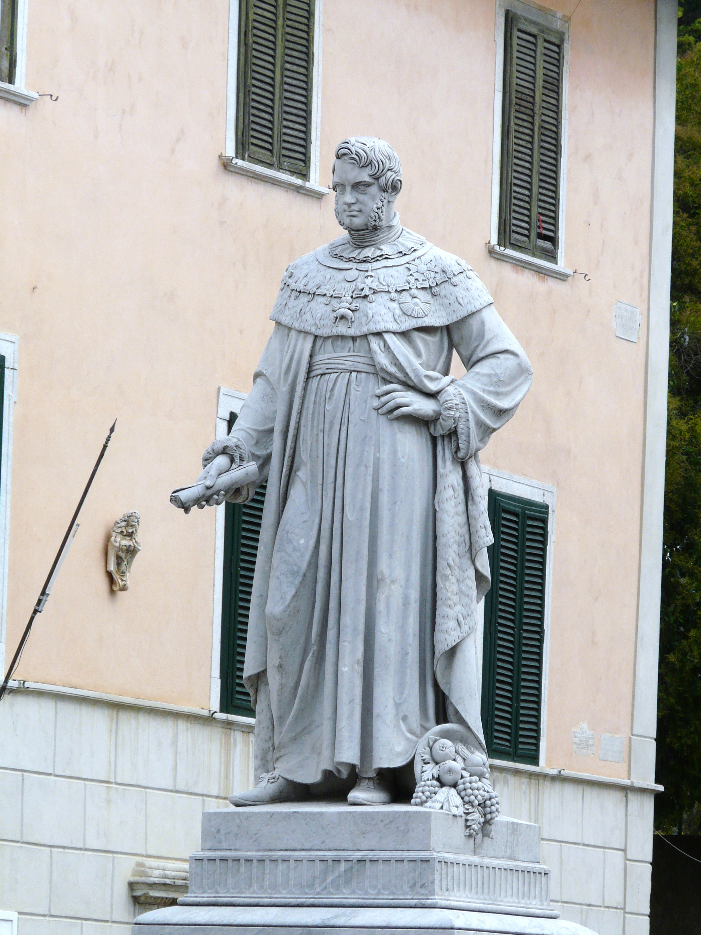 Monumento al Granduca di Toscana Leopoldo II, Pietrasanta, Toscana, Italia